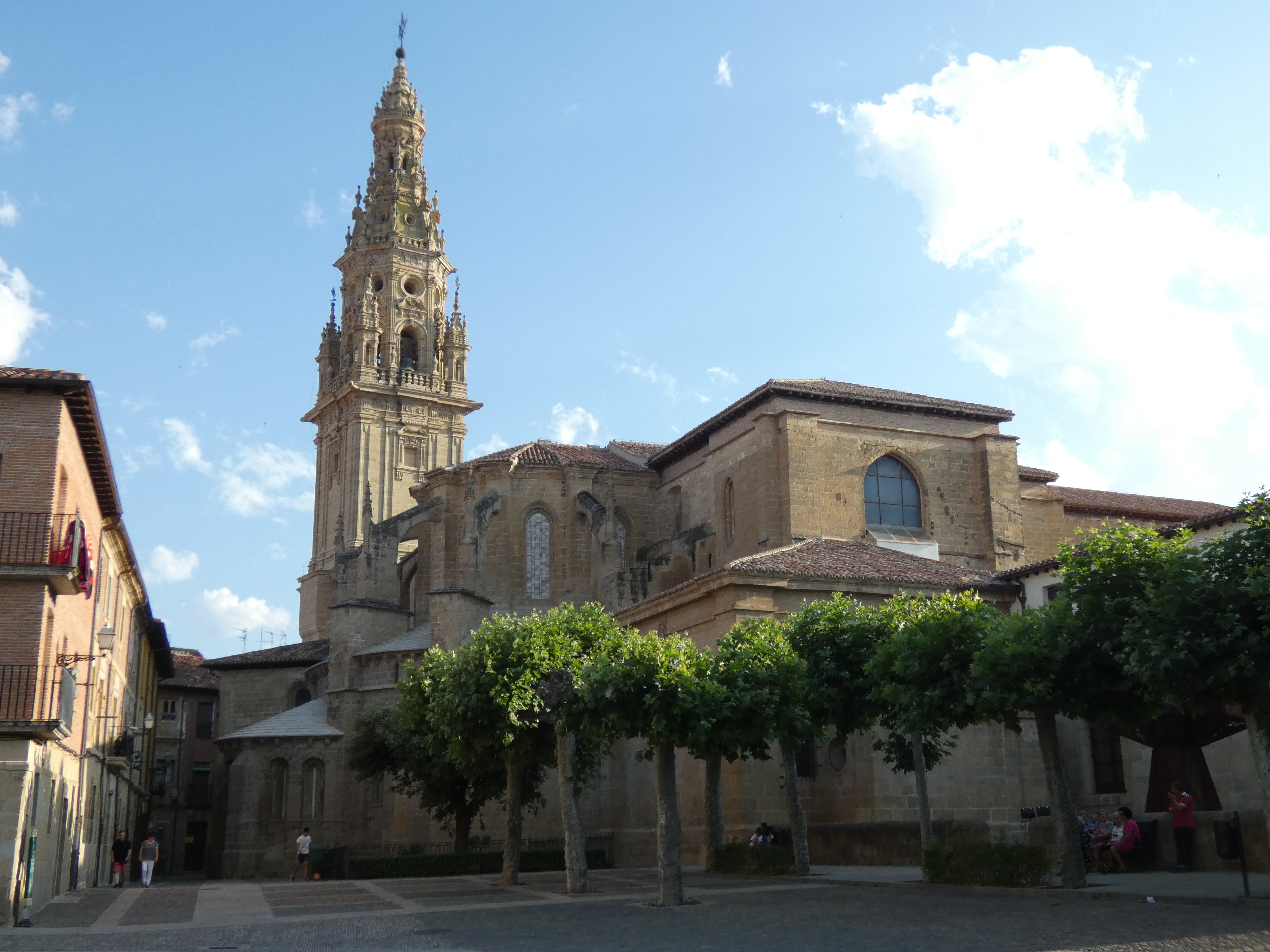 Santo Domingo de la Calzada 2019 parte trasera